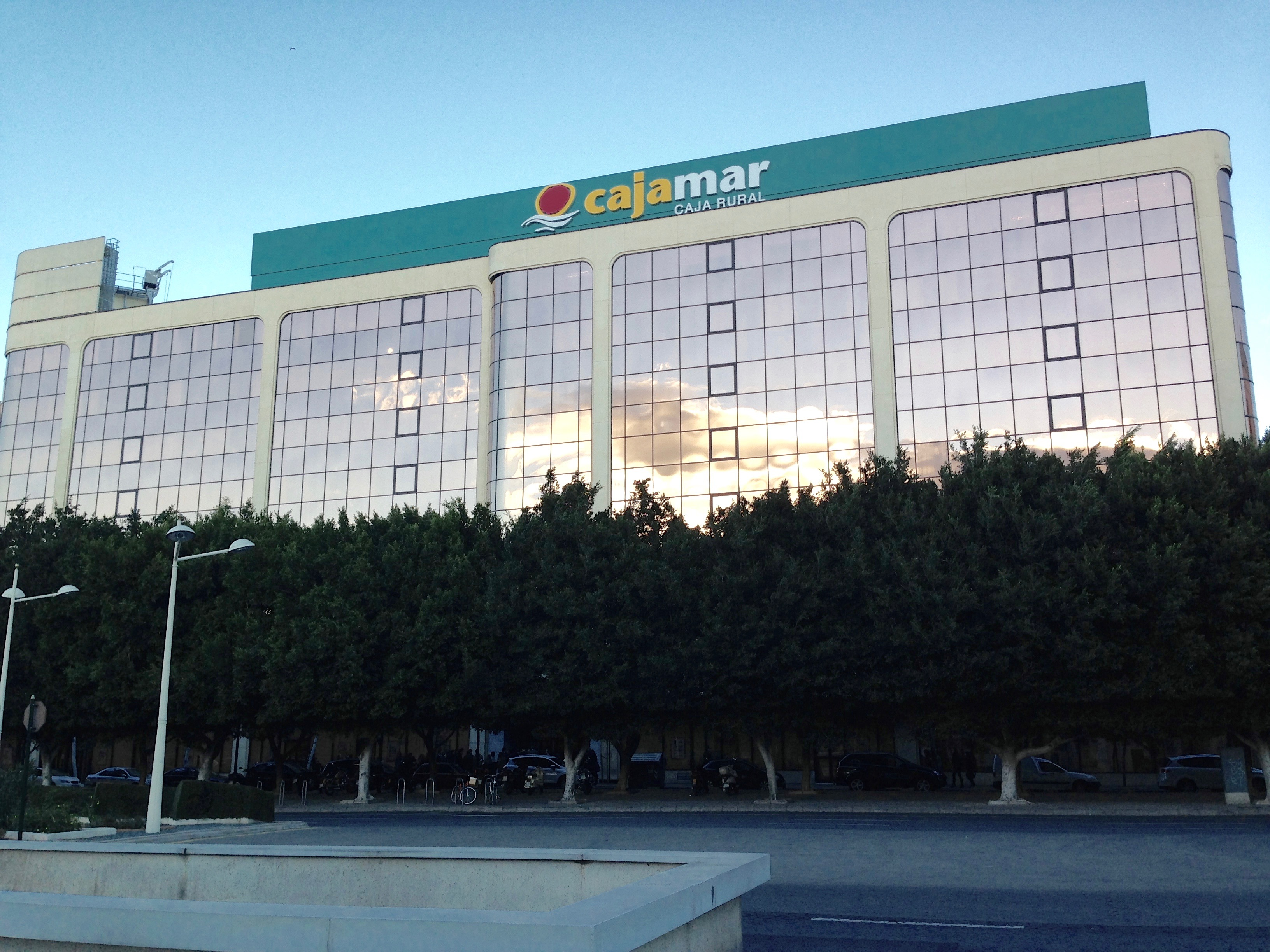 Sede de Cajamar en Valencia